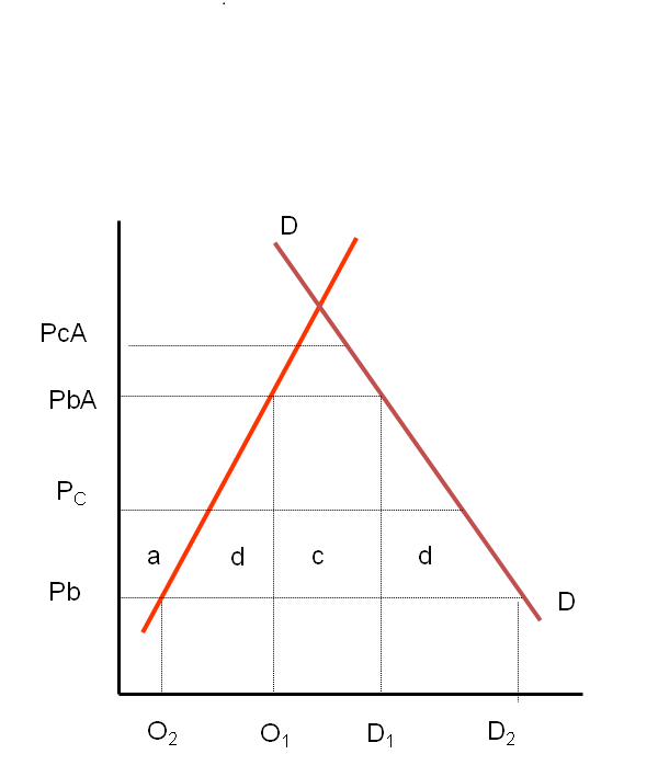 Gráfico que describe la creación de comercio como efecto estático de la integración económica